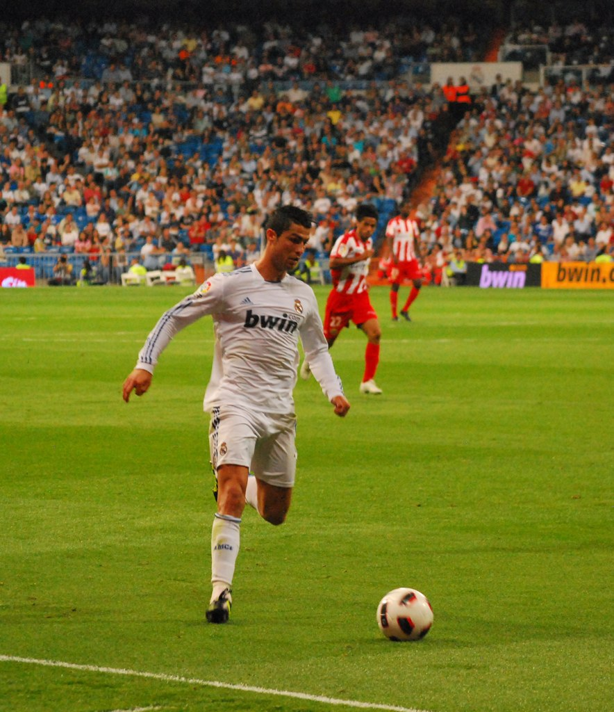 Cristiano Ronaldo lors d'un match entre le Real Madrid et l'UD Almería.